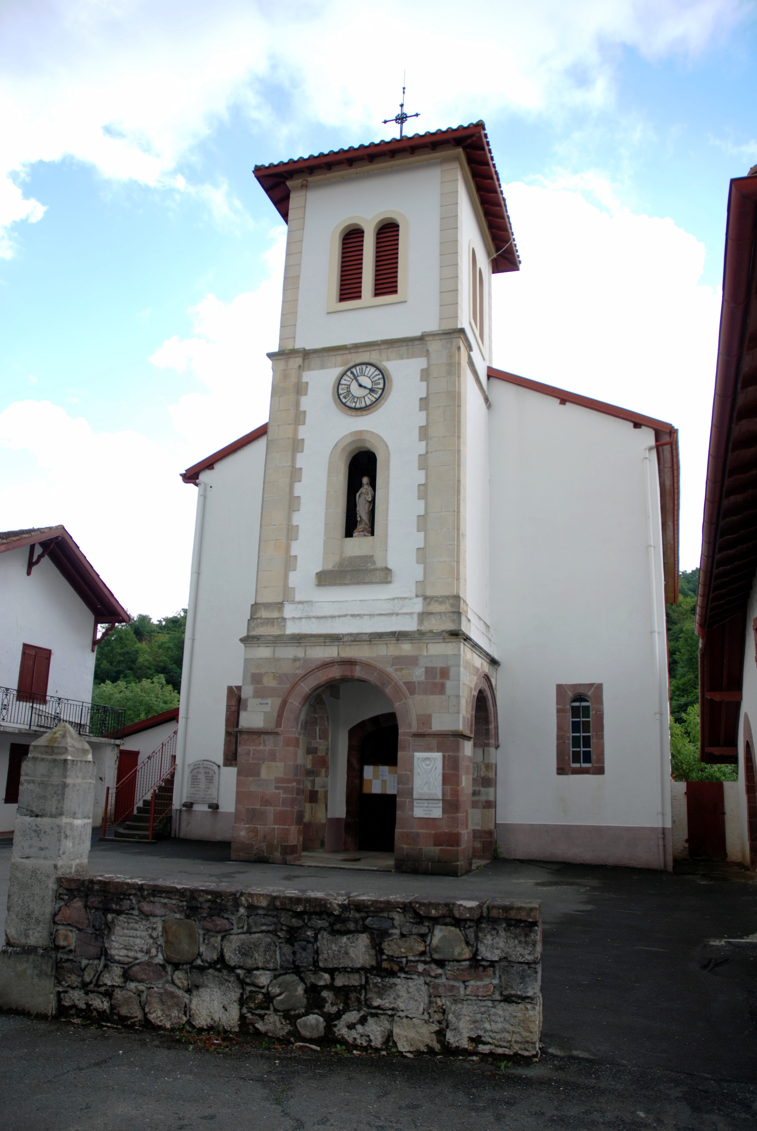 Saint-Michel, l'église Saint-Vincent-de-Dax